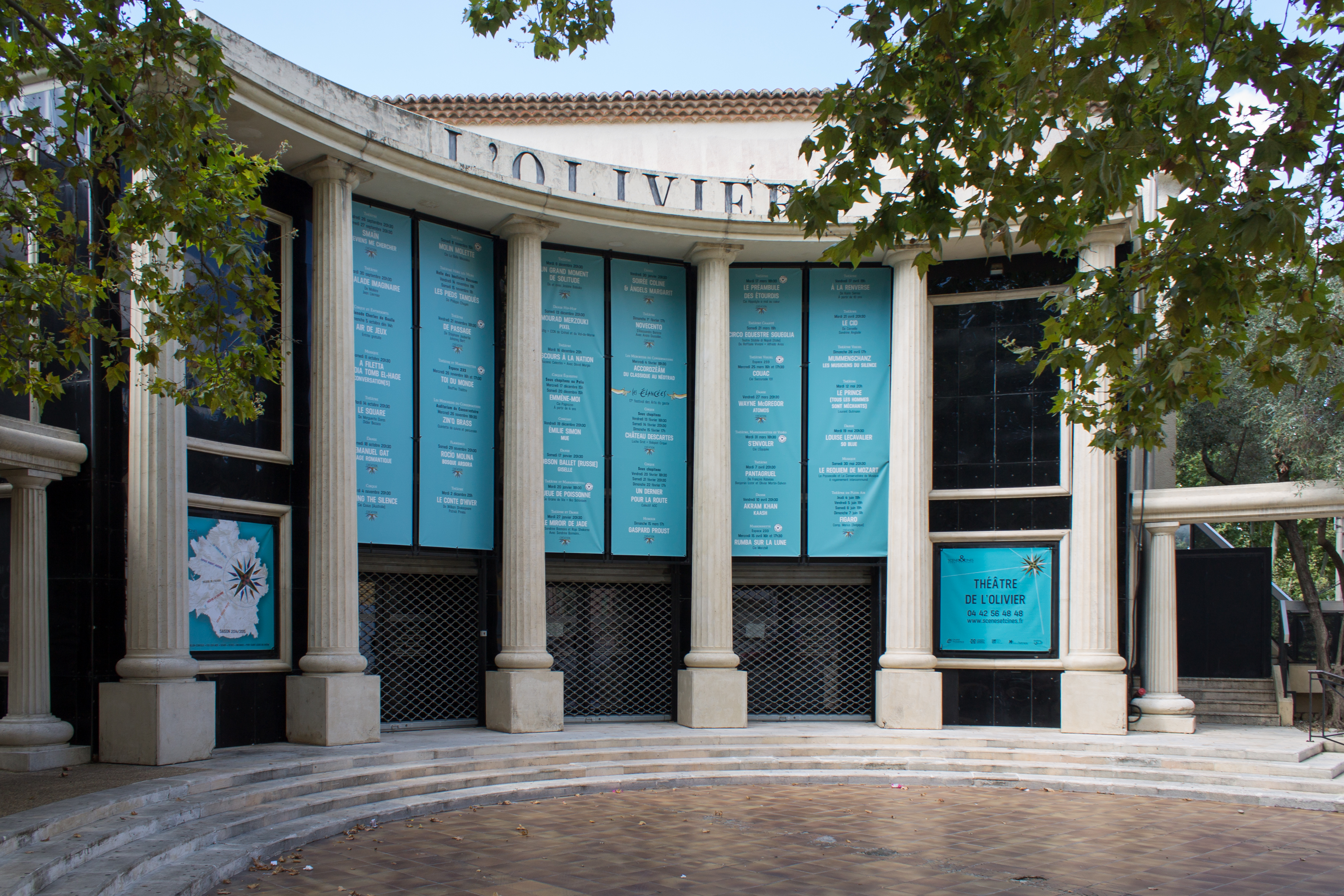 Façade du Theatre de l'olivier à Istres